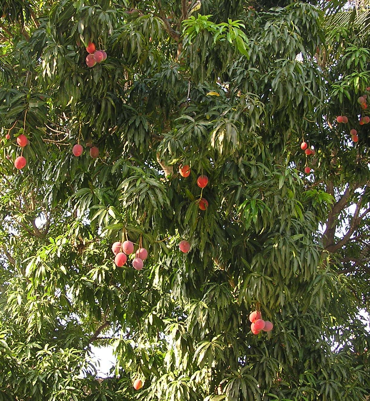 Manguier portant des mangues bien mures (photo prise a Puerto Escondido sur la cote Pacifique du Mexique) Ripe mangos on a mango tree (picture taken in Puerto Escondido - Mexico Pacific coast)